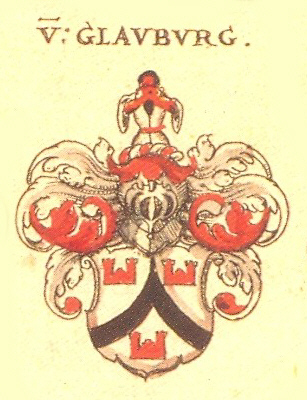 Wappen der Frankfurter Patrizierfamilie Glauburg